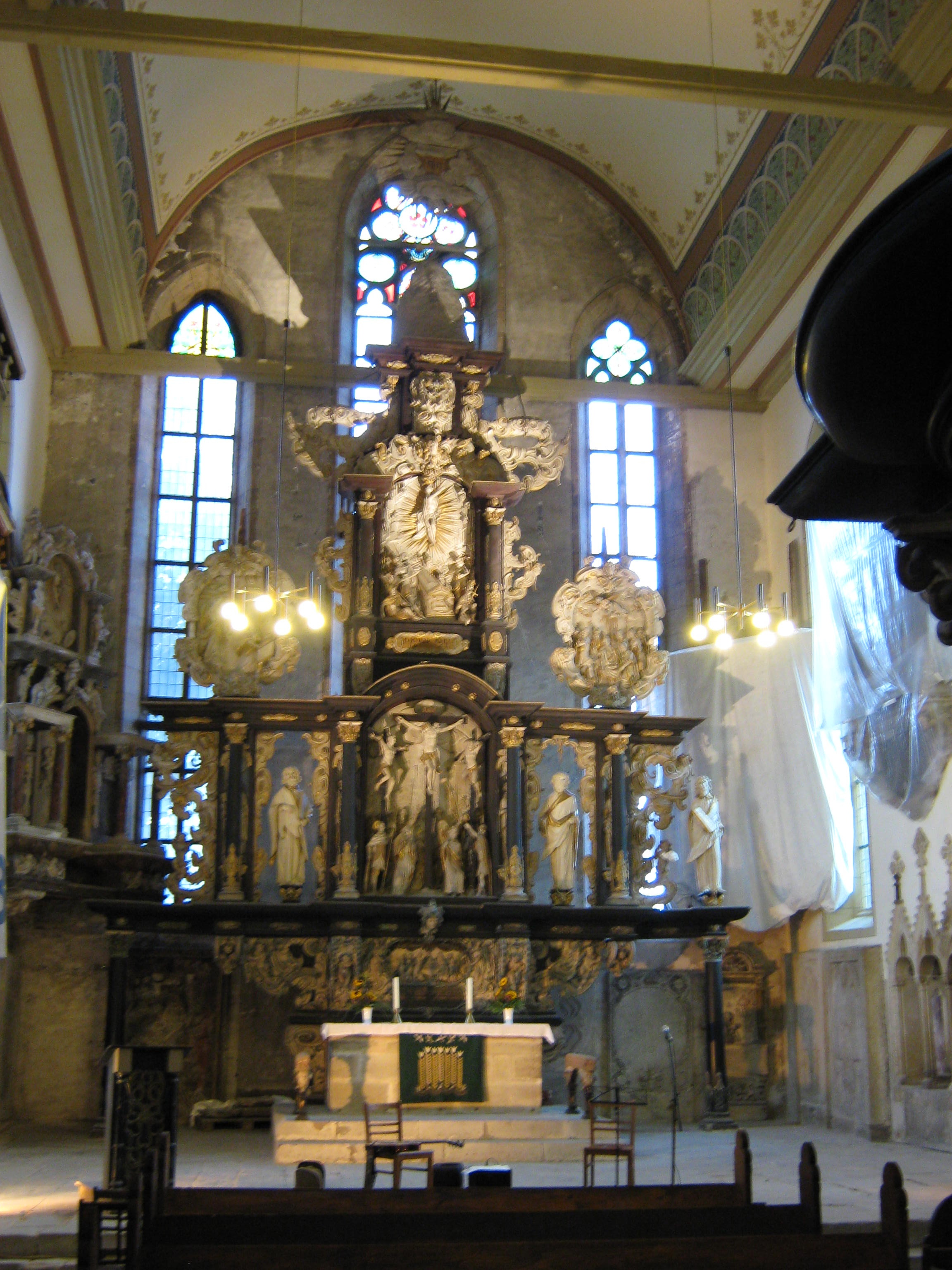 Hochaltar in der Oberkirche in Arnstadt.